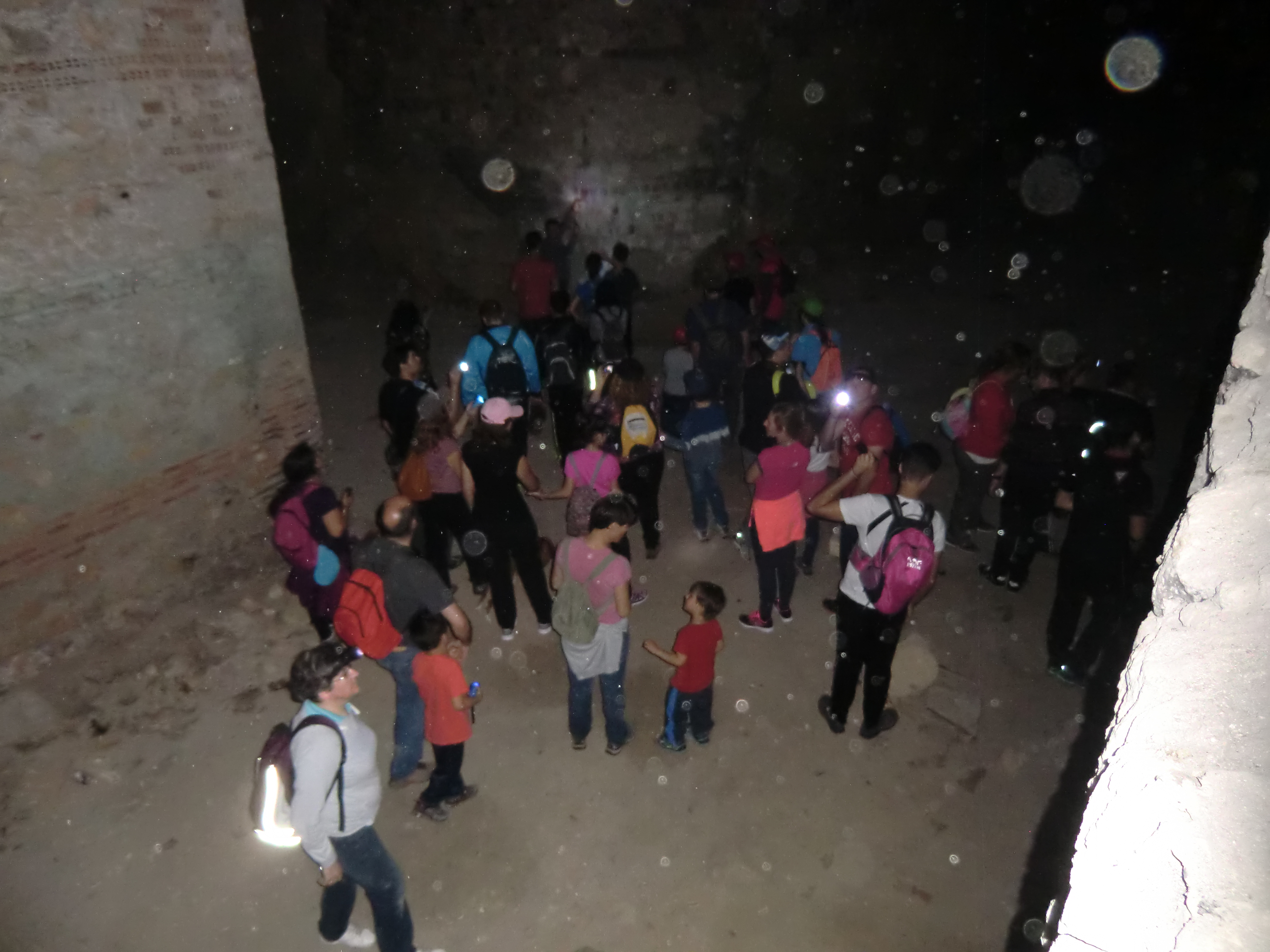 Foto en La Chanca